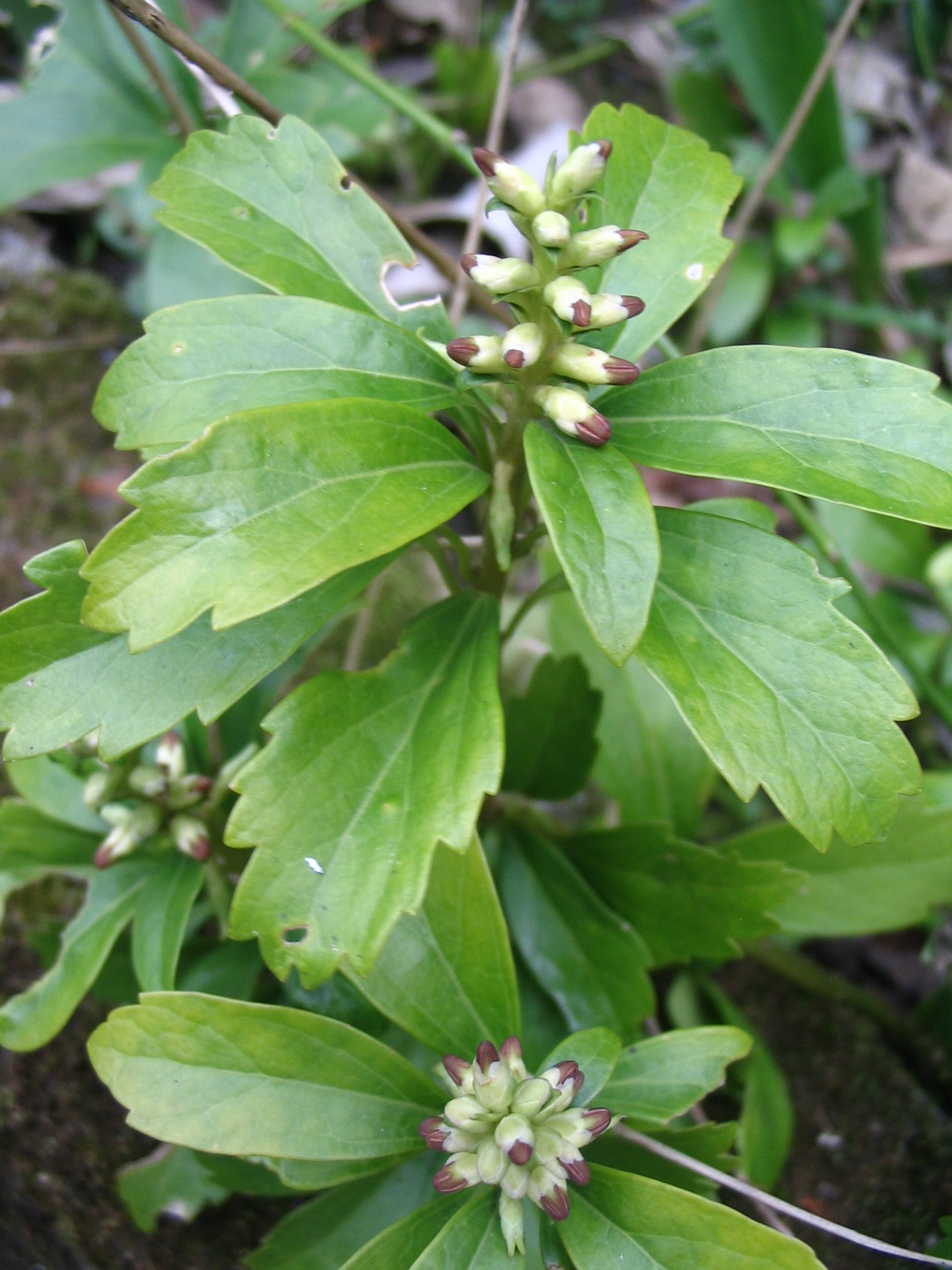 Pachysandra terminalis - Bourgeons de plante cultivée en Ile de France